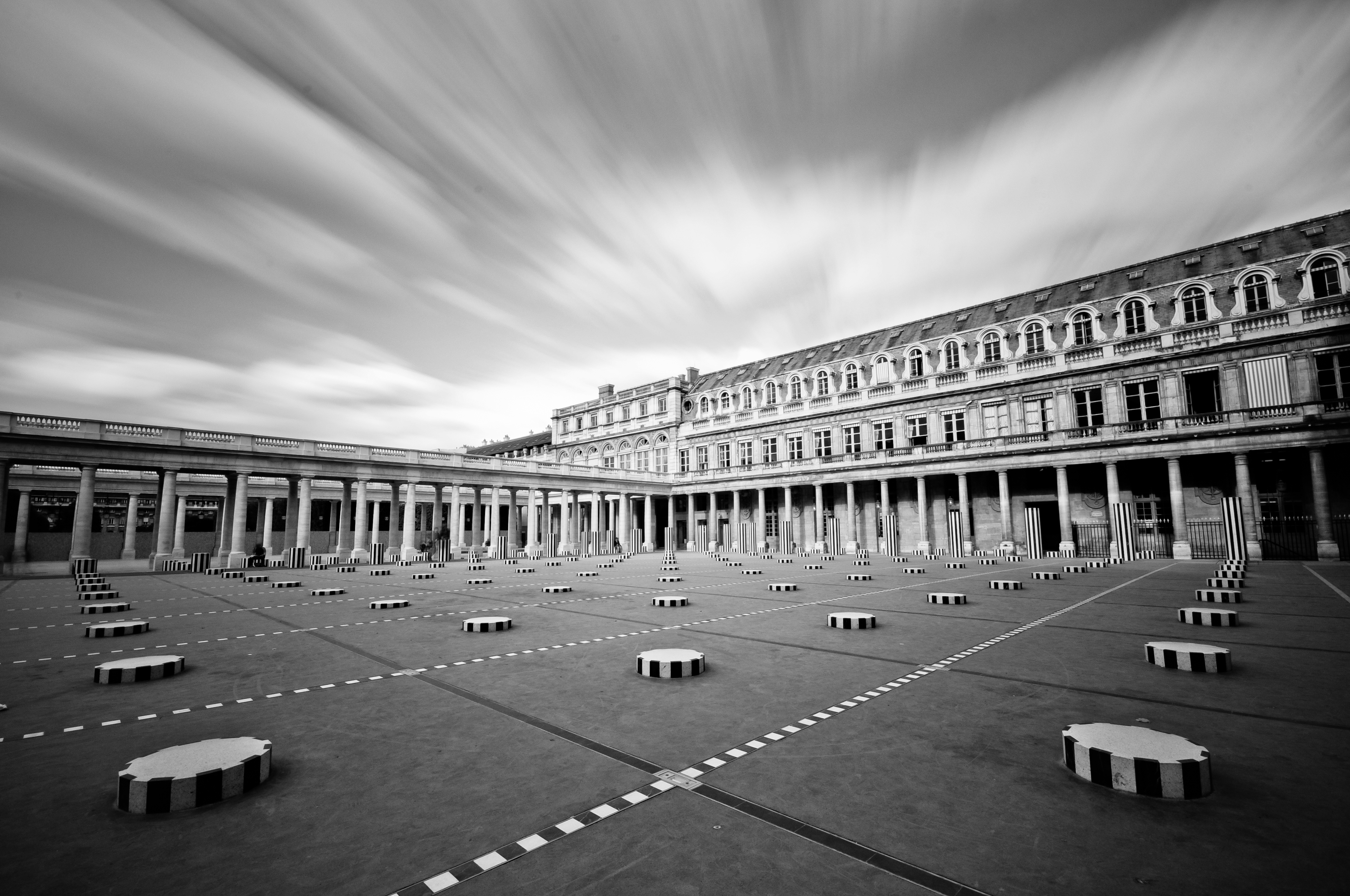 Palais Royal et les Colonnes de Buren, Paris, France.